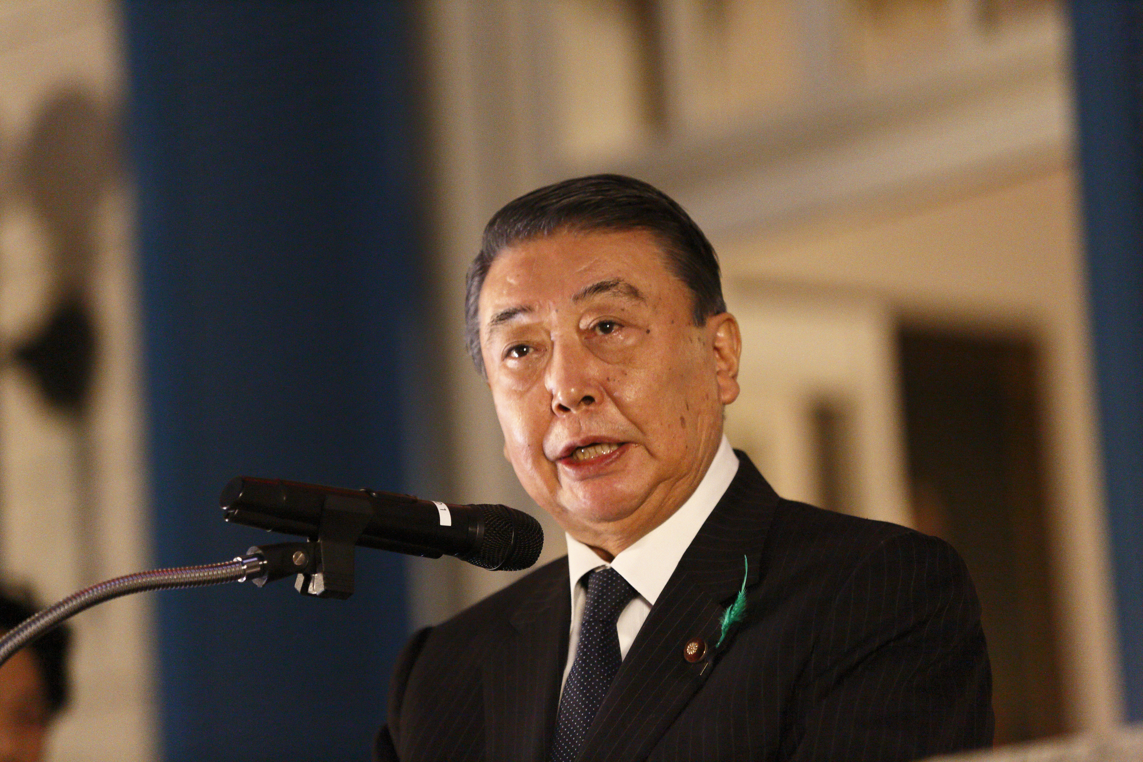 (c)British Embassy Tokyo/Jun Takagi Tadamori Oshima [1]